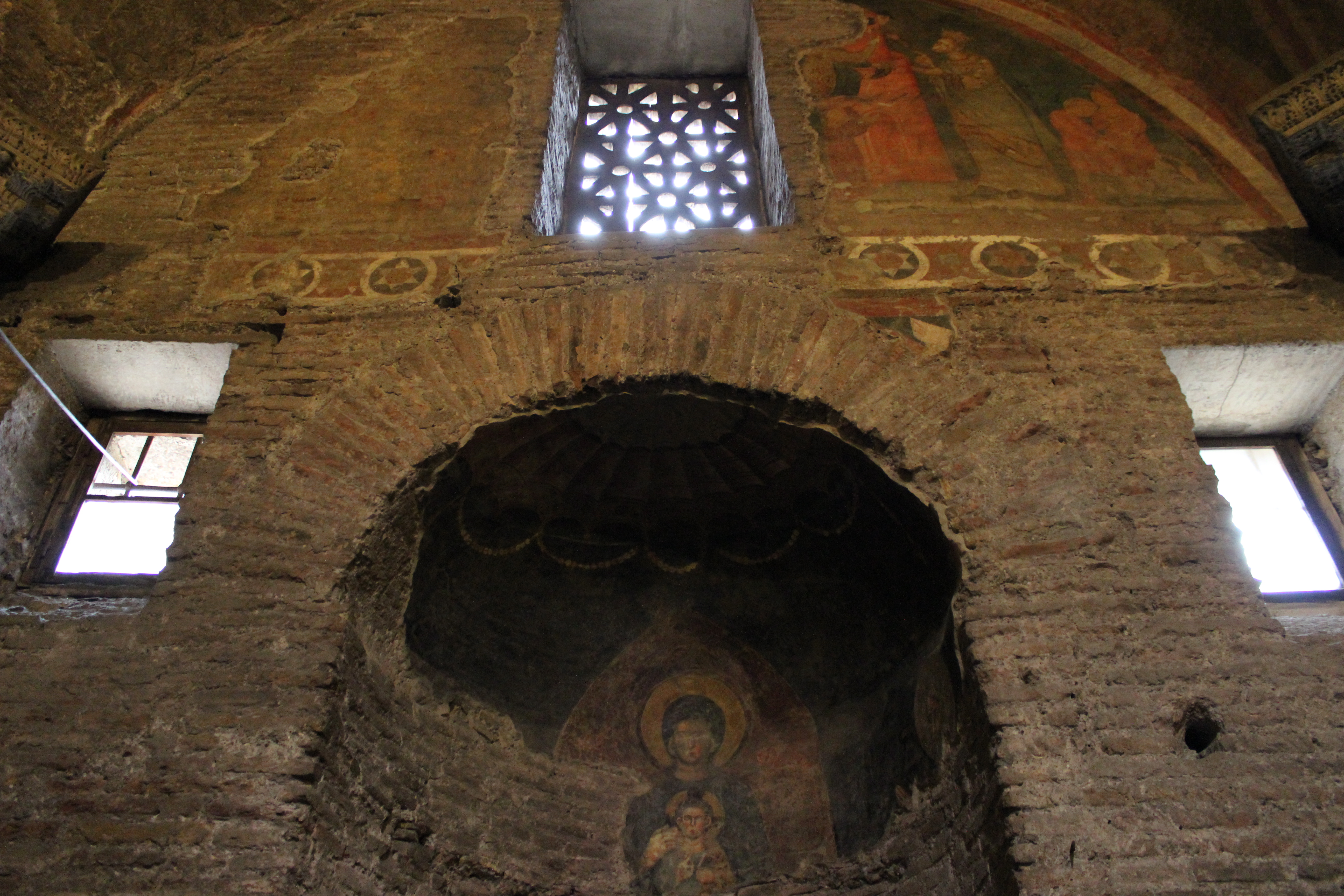 Roma. Santi Quattro Coronati. Capilla de Santa Bárbara en el claustro.